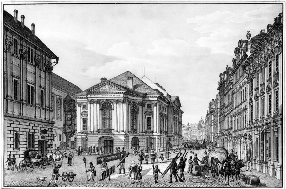 Praha, Rytířská ulice, Stavovské divadlo. Původní podoba exteriéru z r. 1835.